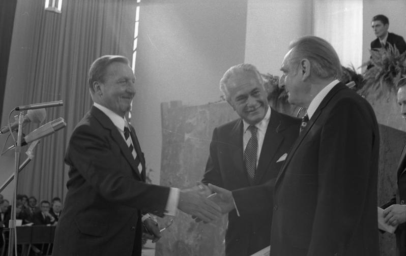 Verleihung des Friedenspreises des Börsenvereins des Deutschen Buchhandels für 1973 an den "Club of Rome" in der Paulskirche Frankfurt. In Anwesenheit von Bundespräsident Dr. G. Heinemann u. Frau (v.l.n.r: Dr. Ernst Klett, Dr. Aurelio Peccei, Prof. Dr. Eduard Pestel (beide Mitgl. d. Exekutiv-Komitees d. "Club of Rome"))